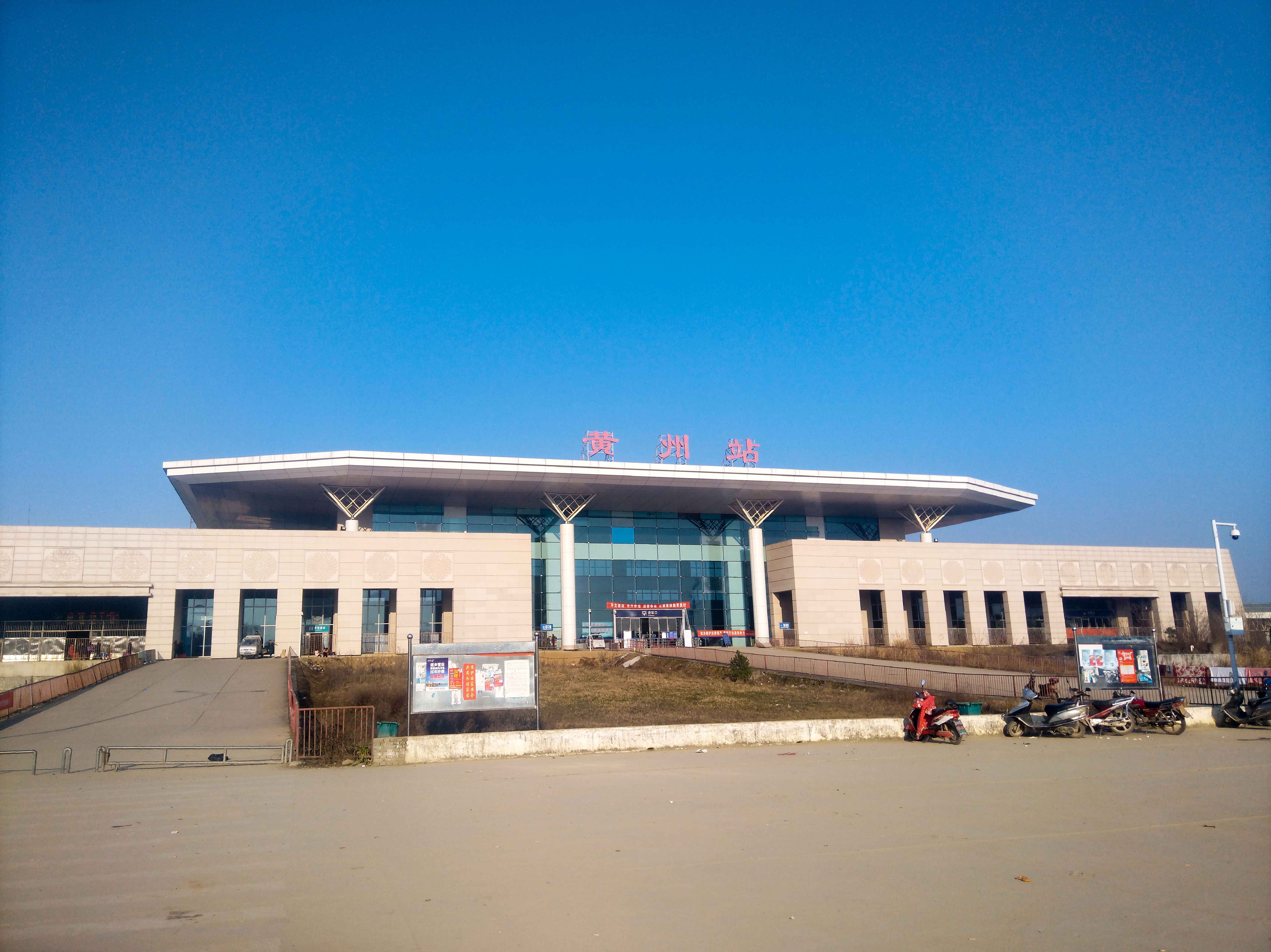 黄州站 (中国)